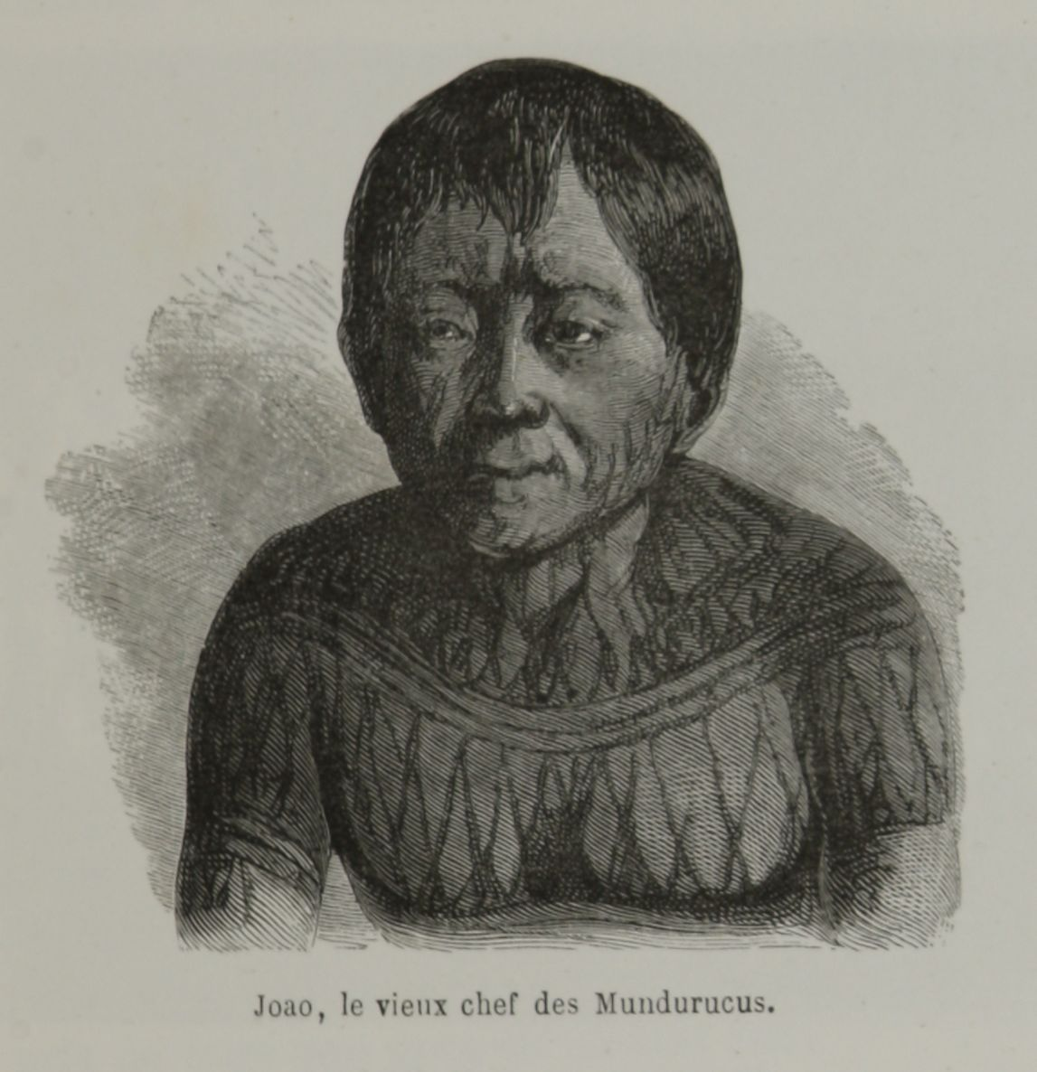 "João, velho chefe dos Mundurucu". Ilustração de índio da tribo mundurucu.